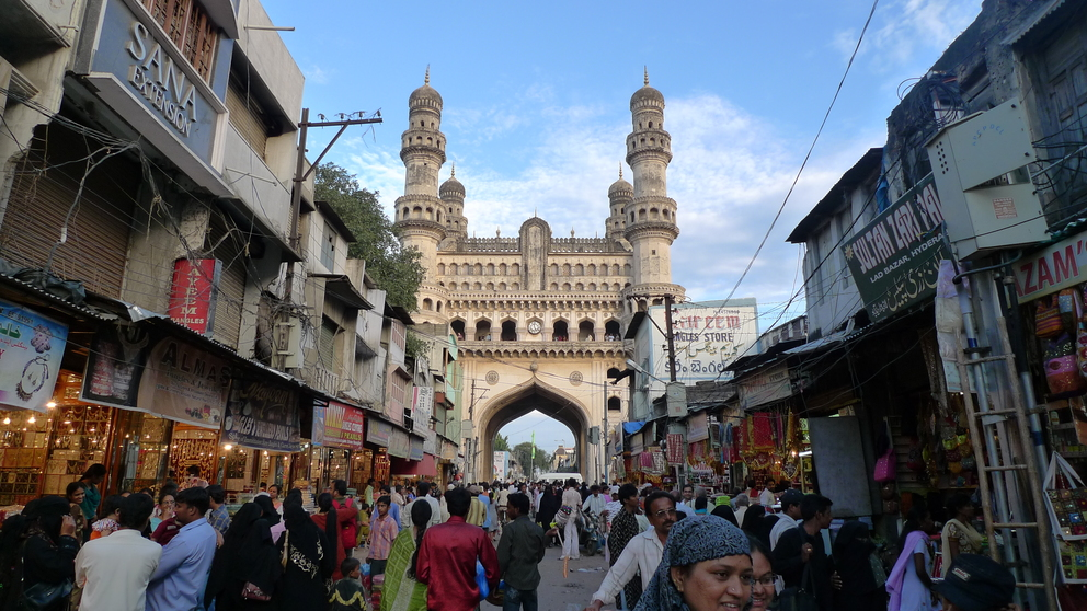 Evening at Laad Bazar near Charminar, Hyderabad